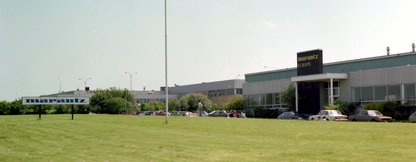 Marantz Europe 1982